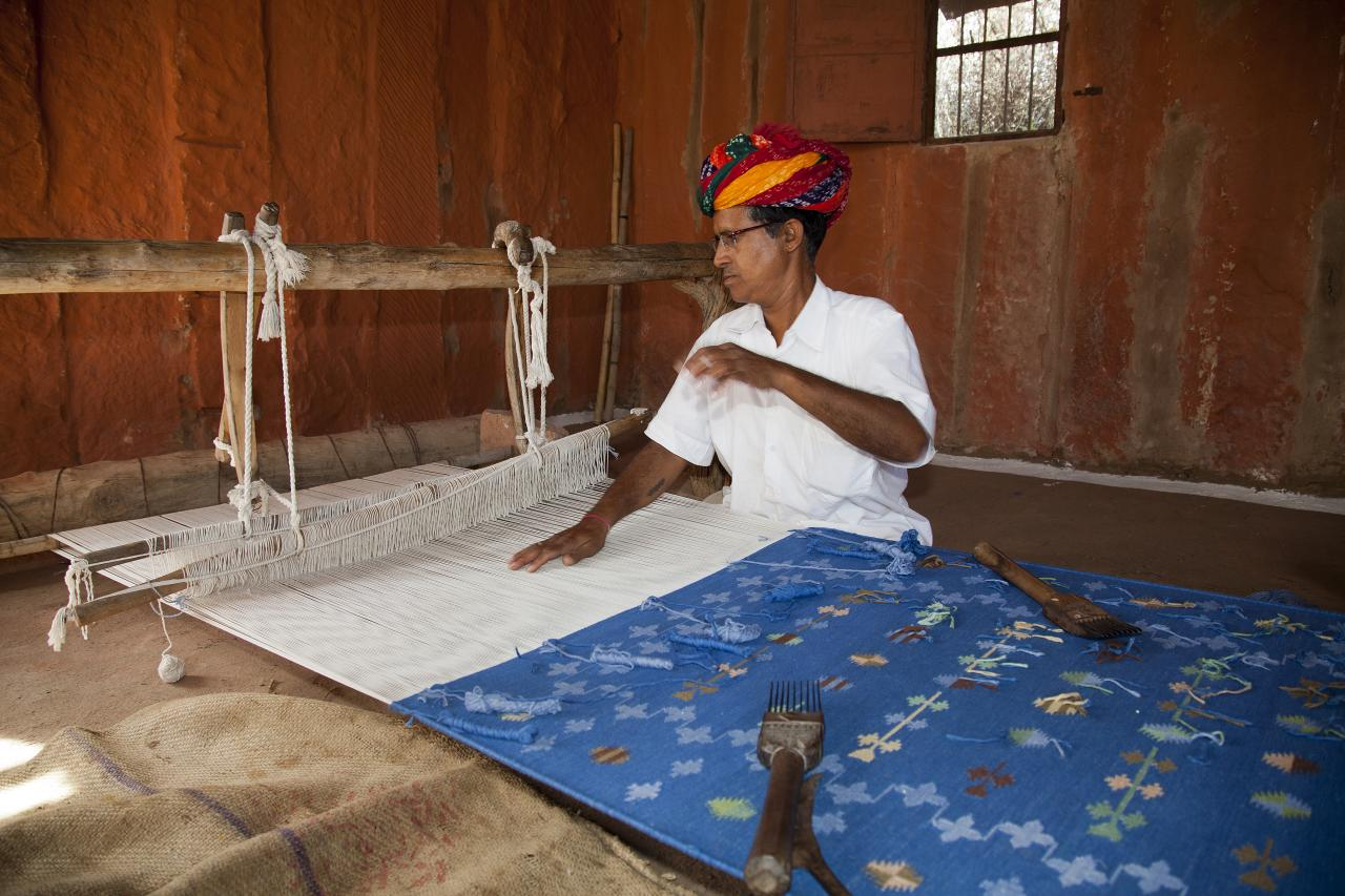 rajasthan